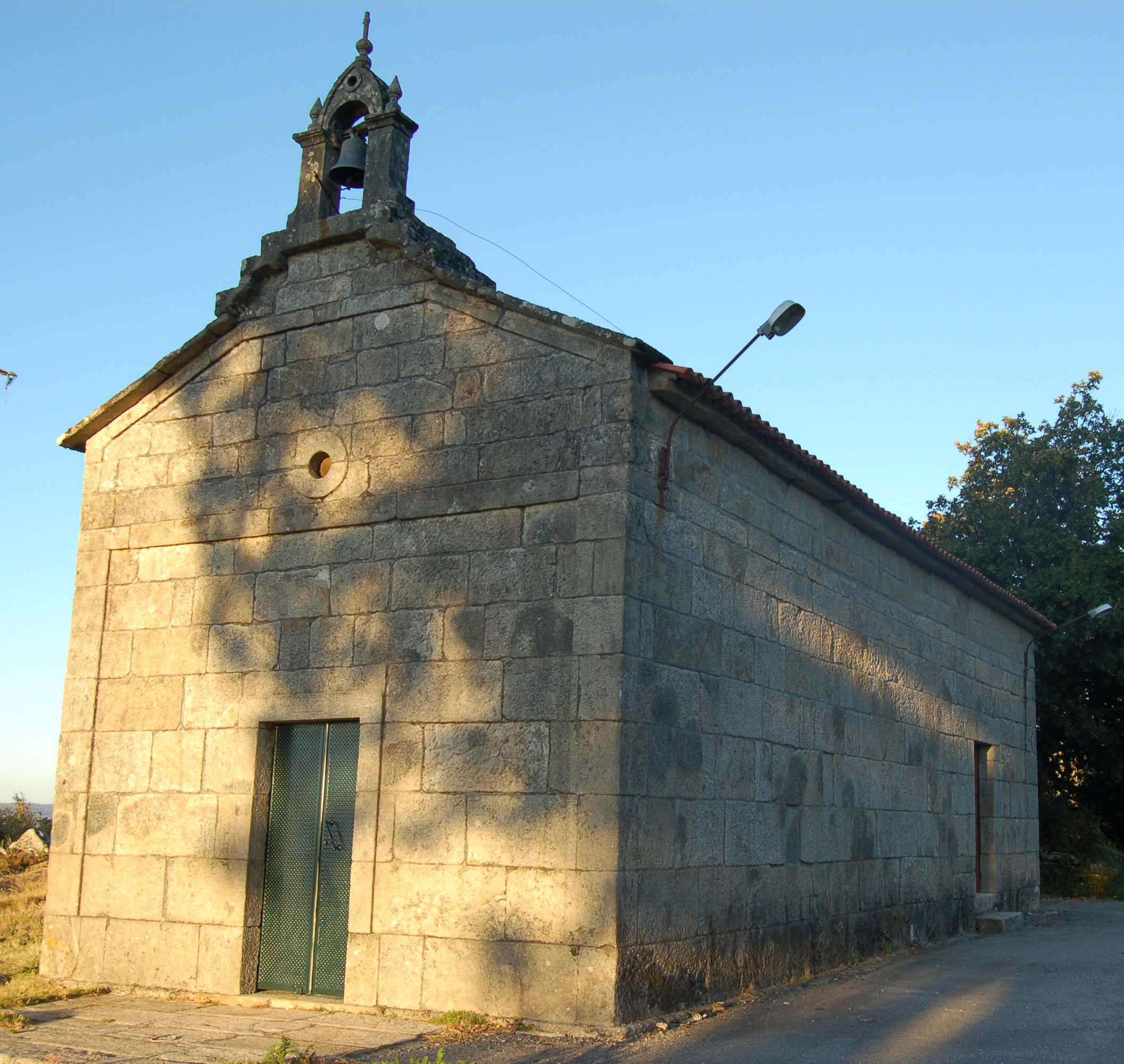 Capela do Anxo da Garga no Cádavo (Sacos, Cerdedo-Cotobade)